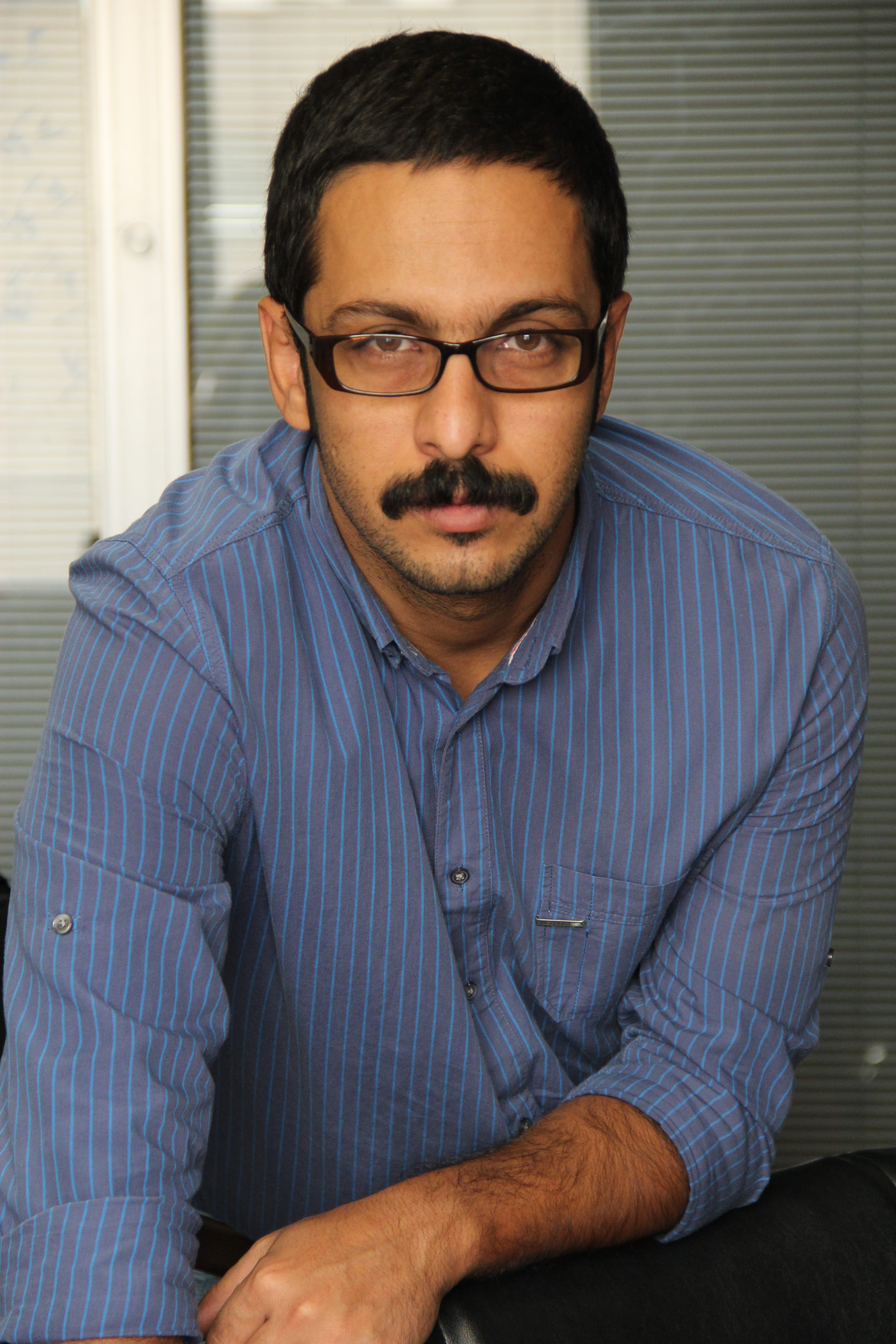 امیر حسین عسگری کارگردان ایرانی متولد اول آذر ماه 1357 تهران.